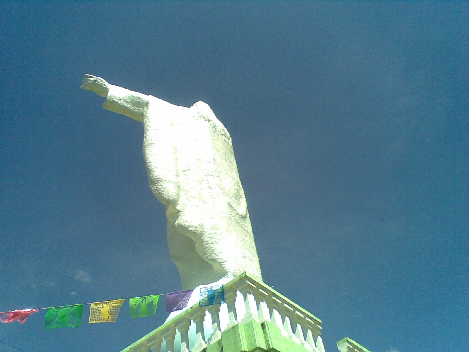 Vista trasera del monumento a Cristo Rey.